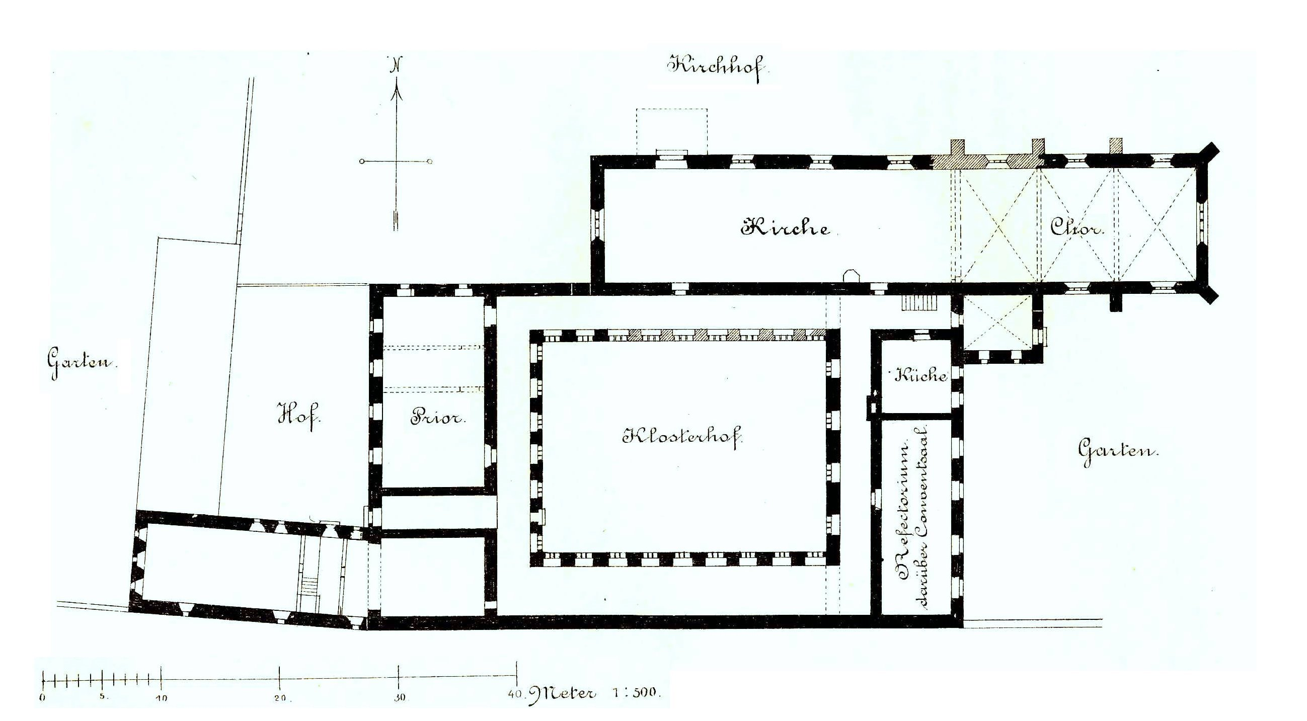 Grundriss des Servitenklosters Kloster Bernburg (aus Otto Köhler: Das Kloster der Marienknechte in Bernburg, ein Beitrag zur anhaltinischen Geschichte. Wissenschaftliche Beilage zum Jahresbericht 1889 no.640, Bernburg, 1890, die Abblung wurde leicht verändert und genordet)